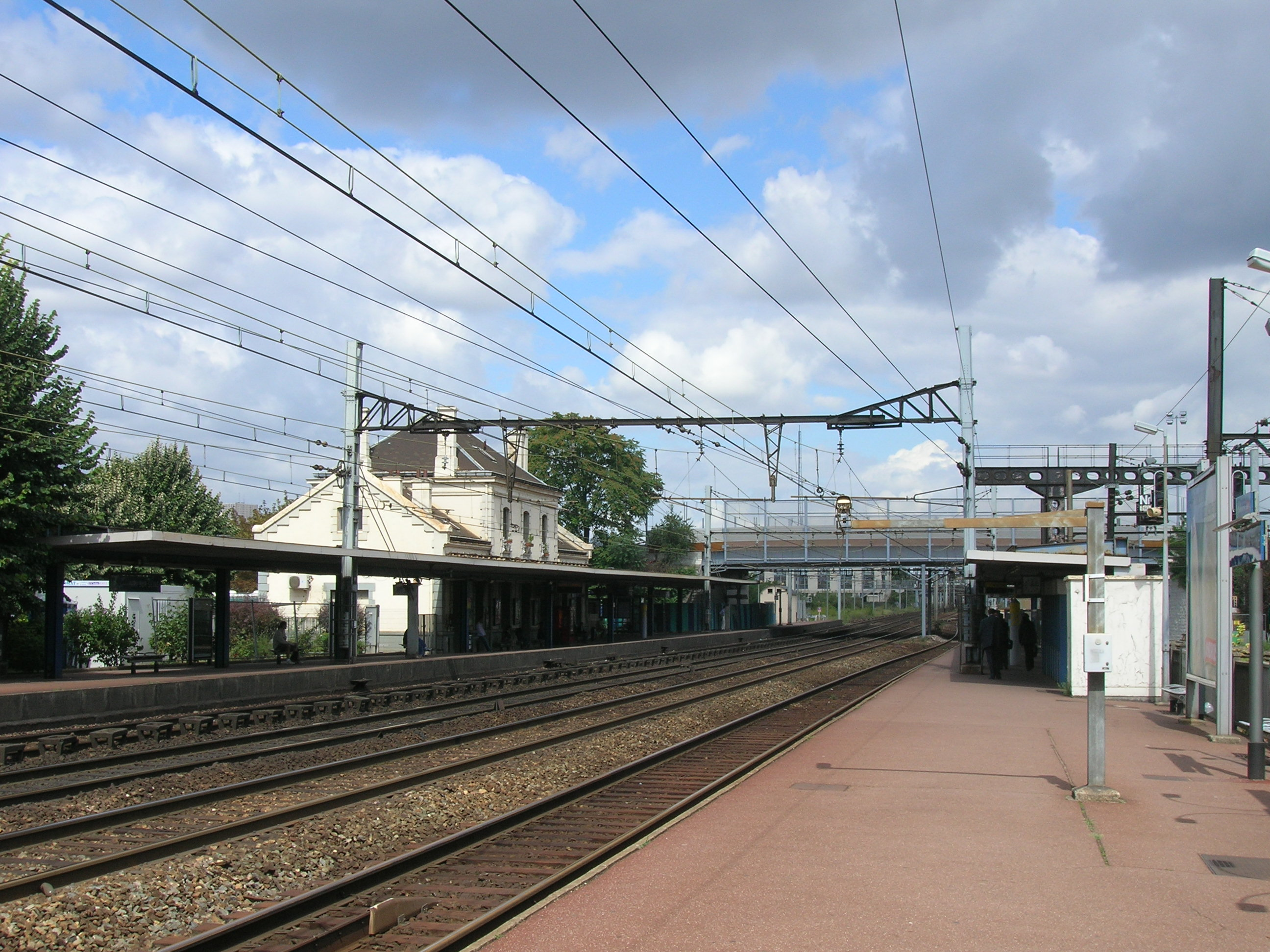 Gare d'Ivry-sur-Seine, near Paris